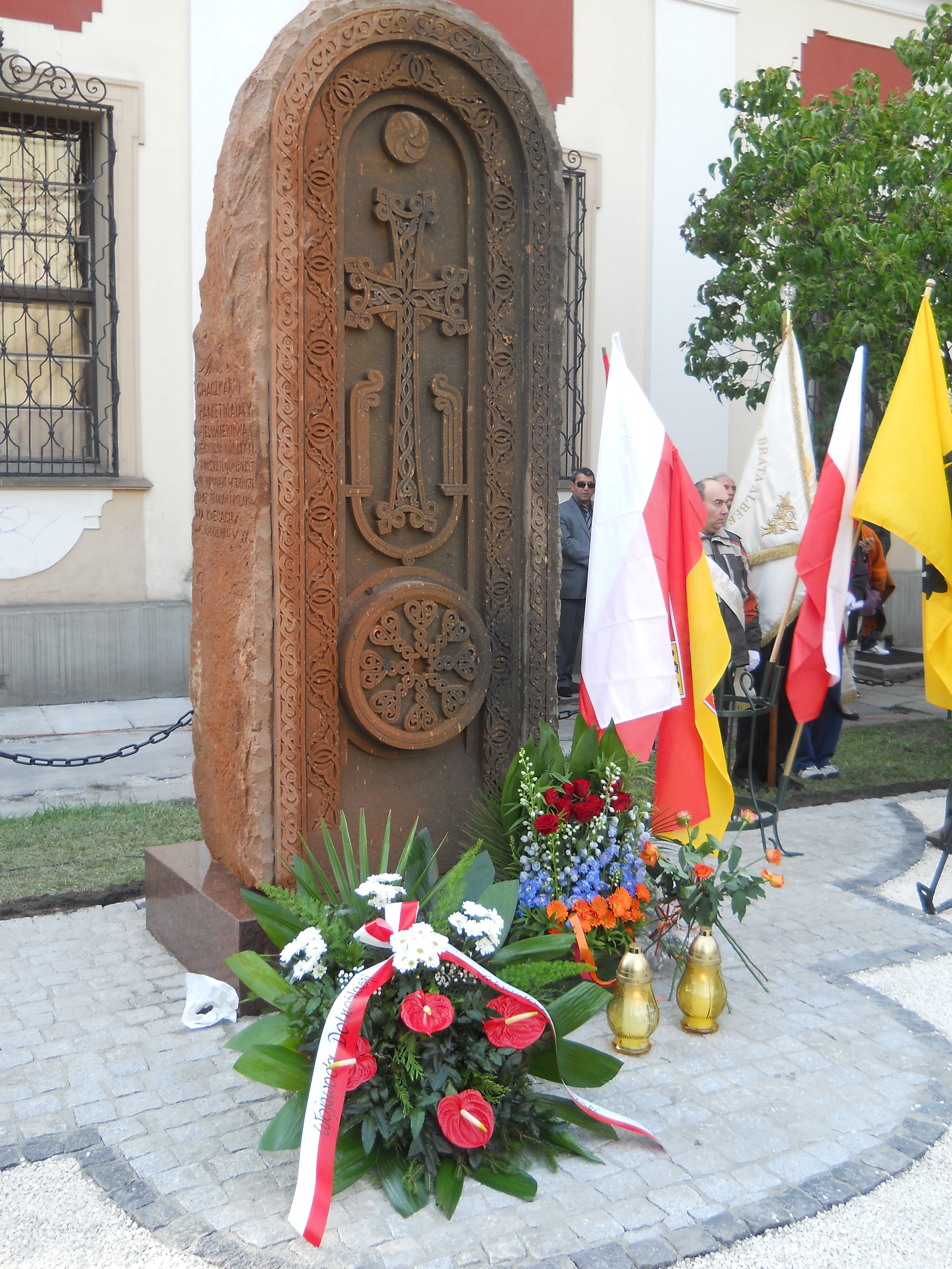 Խաչքար Վրոցլավ քաղաքում, 2012թ․